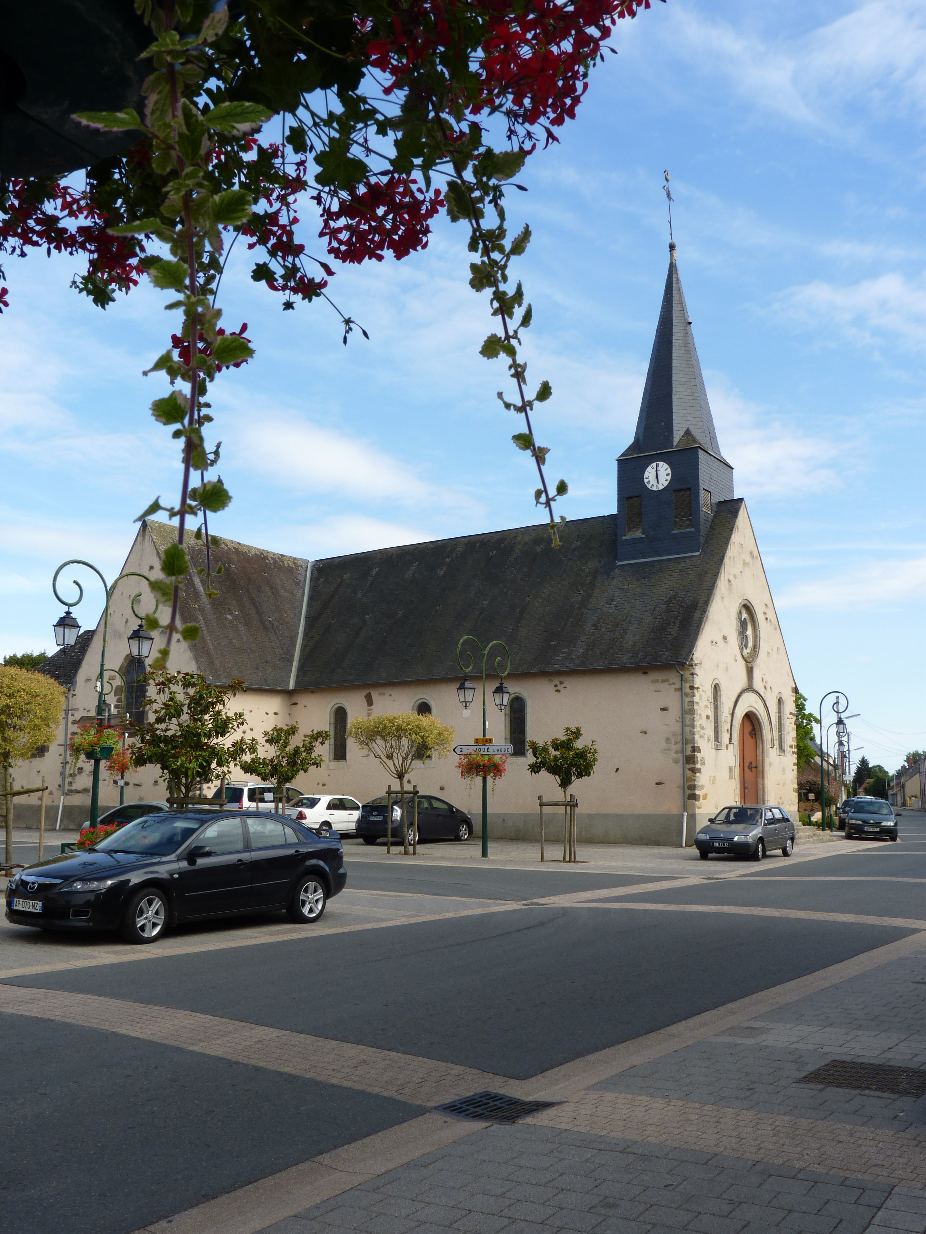 Sarthe - La Guierche - Eglise Sainte Anne